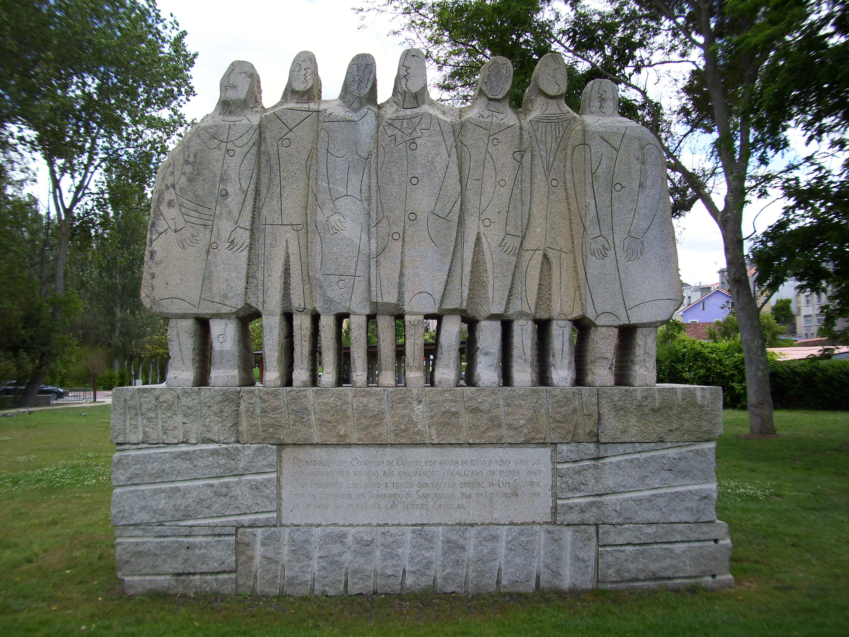 Monumento aos emigrantes no Porto de Santa Cruz (Oleiros). Deseño de Luís Seoane.